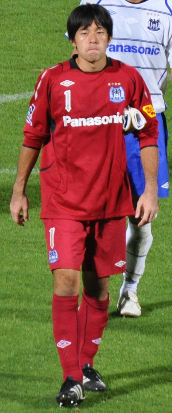 Kawasaki Frontale vs Gamba Osaka_444